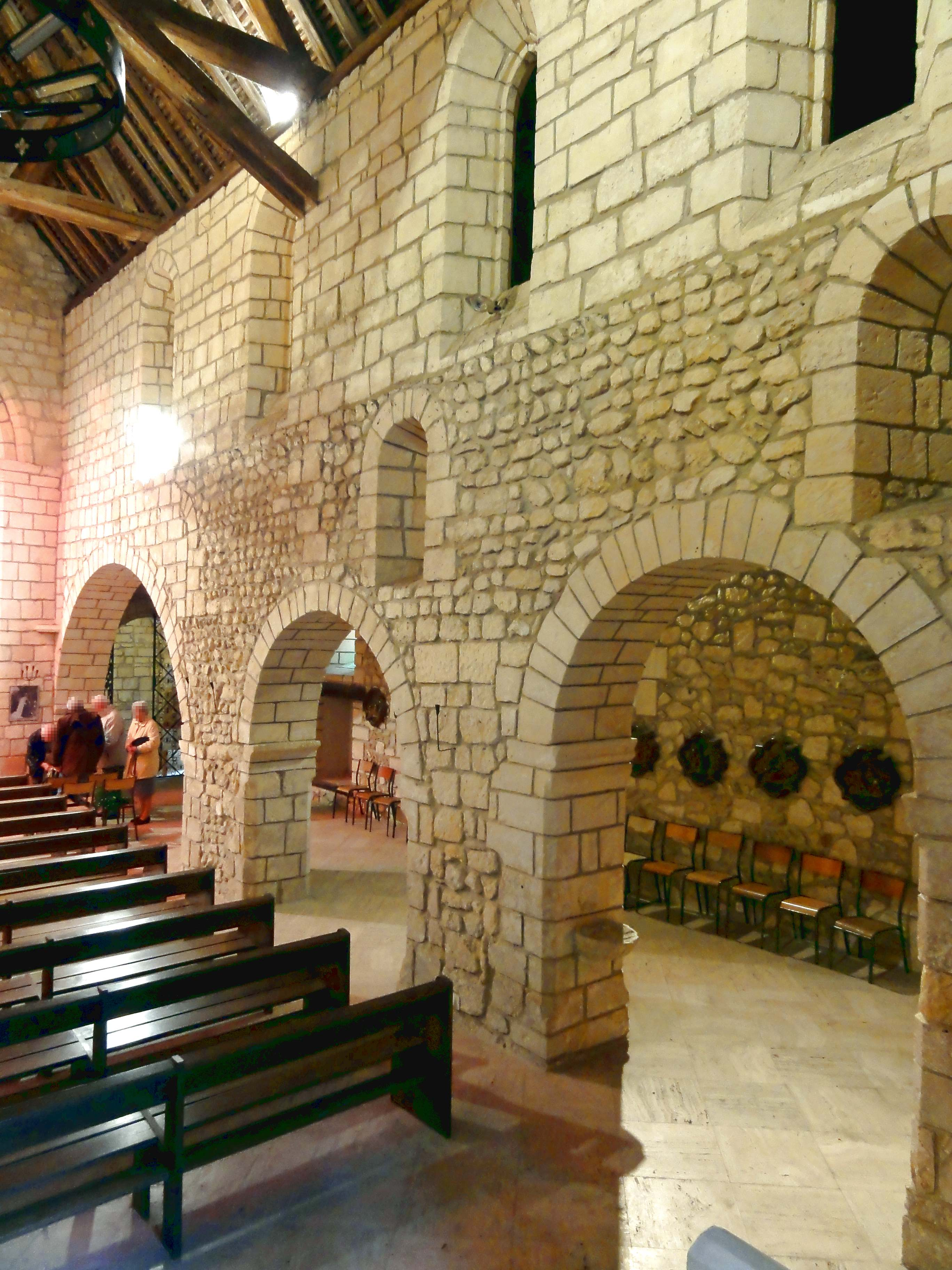 Intérieur de l'église - voir titre.